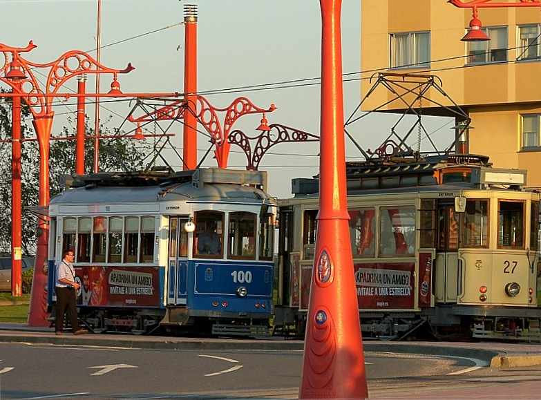 Dous tranvías na Coruña